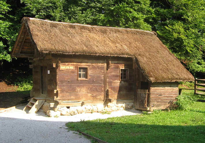 Geburtshaus von Josip Jurčič, slowenische Schriftsteler Quelle: eigene Aufnahme July 2005 Fotograf: Janez Novak, Ljubljana, Slovenija